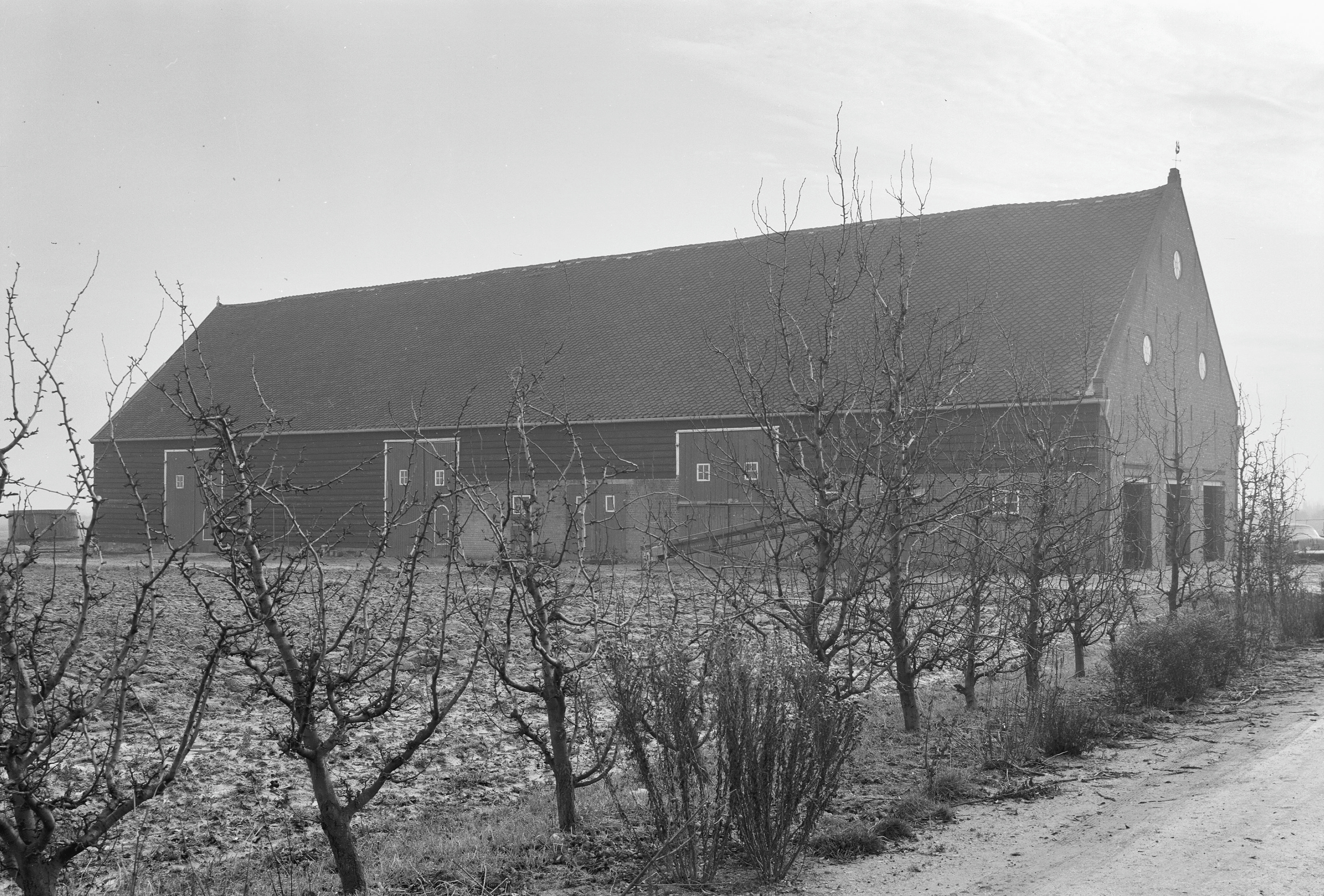 Schuur: Grote schuur met drie wagendeuren, drie oculairvensters in de zijgevel, akker en geboomte op de voorgrond